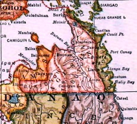 Fragmento del Collier's New Encyclopedia, v. 7, 1921, facing p. 223.